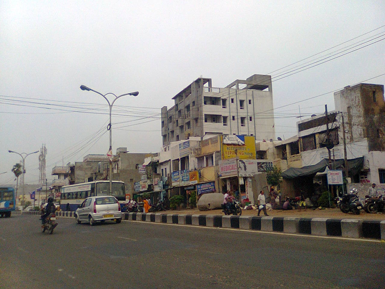 మల్కాపురం